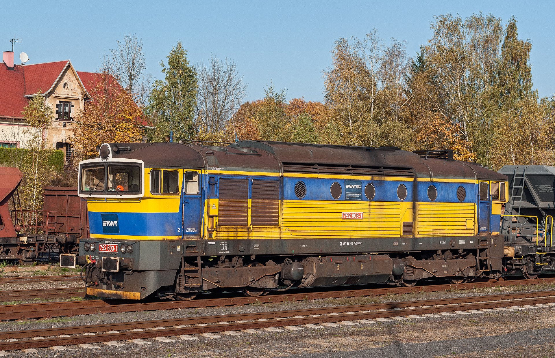 Lokomotiva 752.603 dopravce AWT na pracovním vlaku v železniční stanici Rumburk